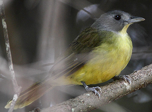 Image taken at Makasutu, The Gambia. An adult bird in deep shade.